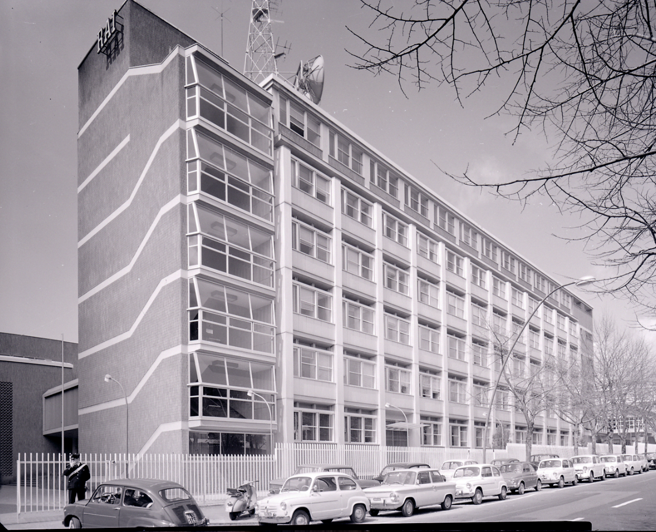 Servizio fotografico : Napoli, 1966 / Paolo Monti. - Buste: 45, Fototipi: 50 : Negativo b/n, gelatina bromuro d'argento/ pellicola ; 10x12. - ((Serie costituita da 45 buste sciolte di negativi identificati con i nn.: 12527, 12528, 12529, 12530, 12531, 12532, 12533, 12534, 12535, 12536, 12537, 12538, 12539, 12540, 12541, 12542, 12543, 12544, 12545, 12546, 12547, 12548, 12549, 12550, 12551, 12552, 12553, 12554, 12555, 12556, 12557, 12558, 12559, 12560, 12561, 12562, 12563, 12564, 12565, 12566, 12567, 12568, 12569, 12570, 12571, 12572. - Fonte: Agenda di Paolo Monti: Monti/ 3 aprile 1966 - 9 marzo 1971/ 12421-16823 (1966-1971)